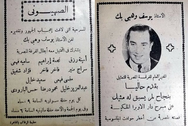 إعلان مسرحية الصهيوني ليوسف وهبي.